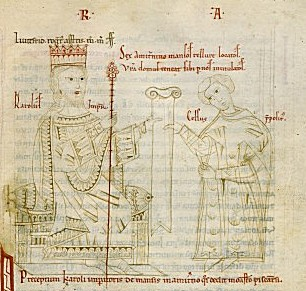 Charles III le Gros et Celse de Casauria